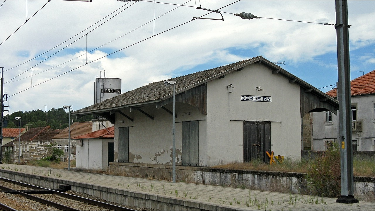 4 / Agosto / 2009 E os sinais mantêm-se no sitio onde foram encostados em Abril....